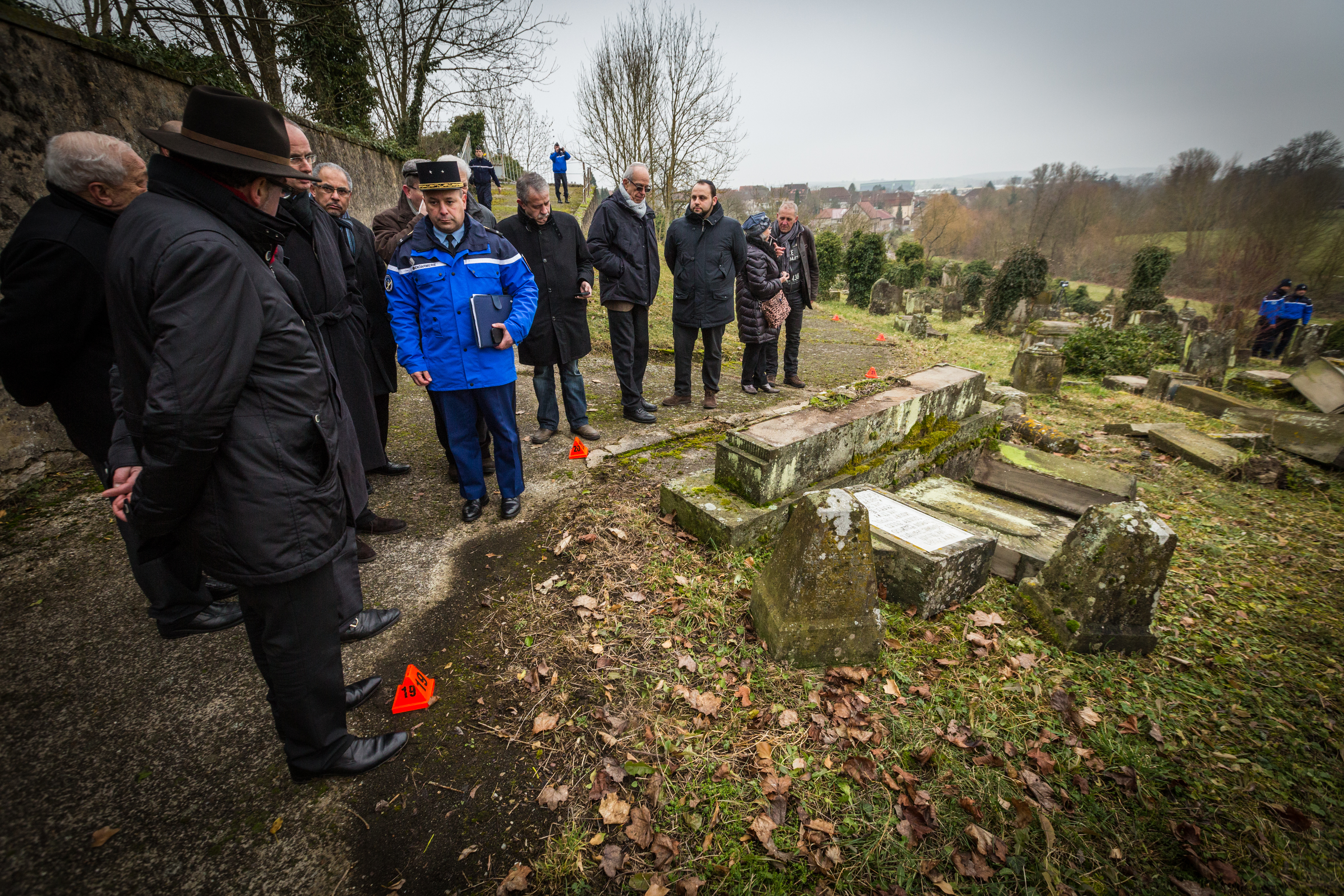 Sarre-Union, les autorités de la Communauté juivent découvrent le mémoirial de la Shoah après sa profanation dans le cimetière juif